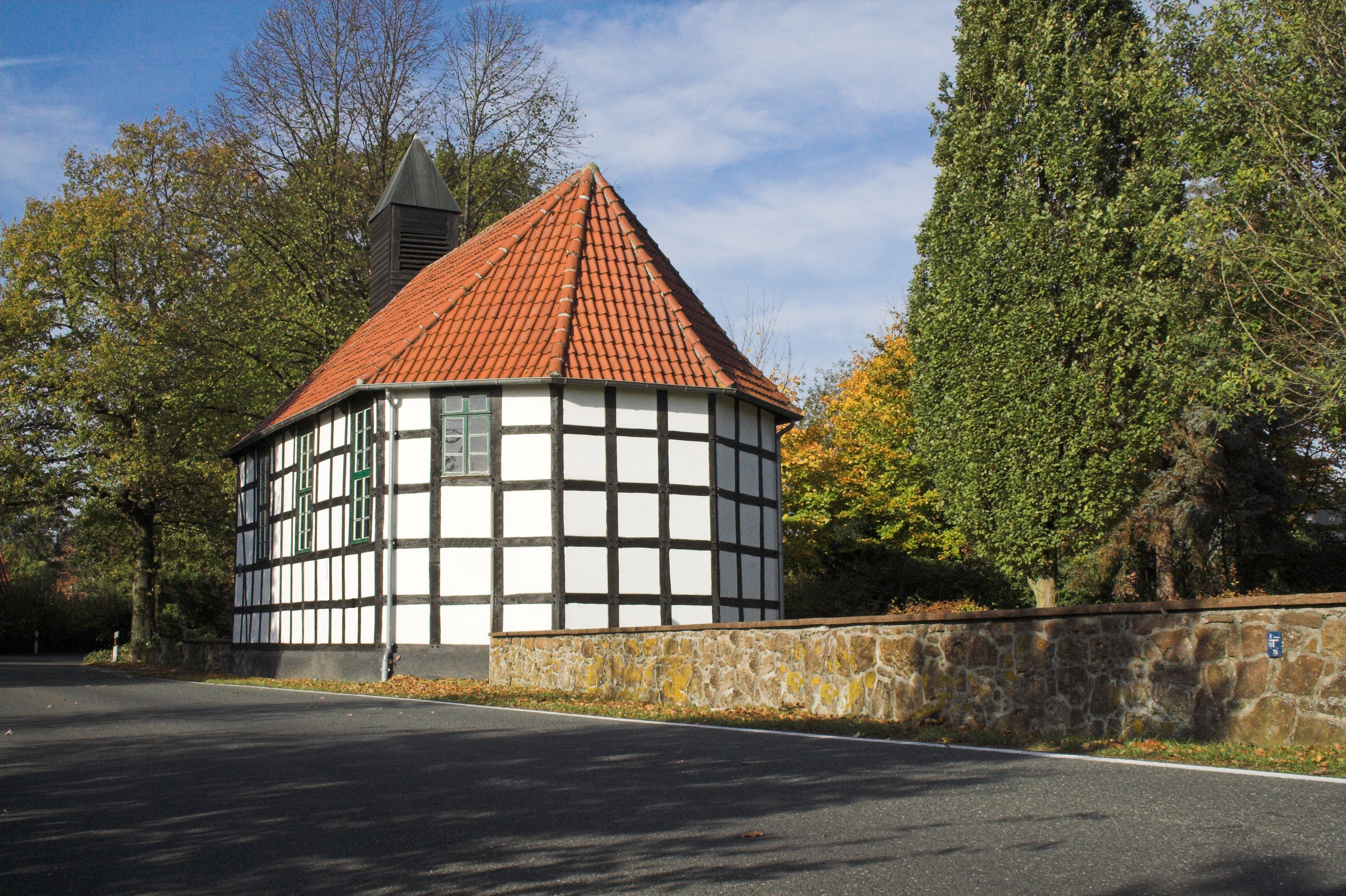 Alte Klus (Kapelle in Frotheim)